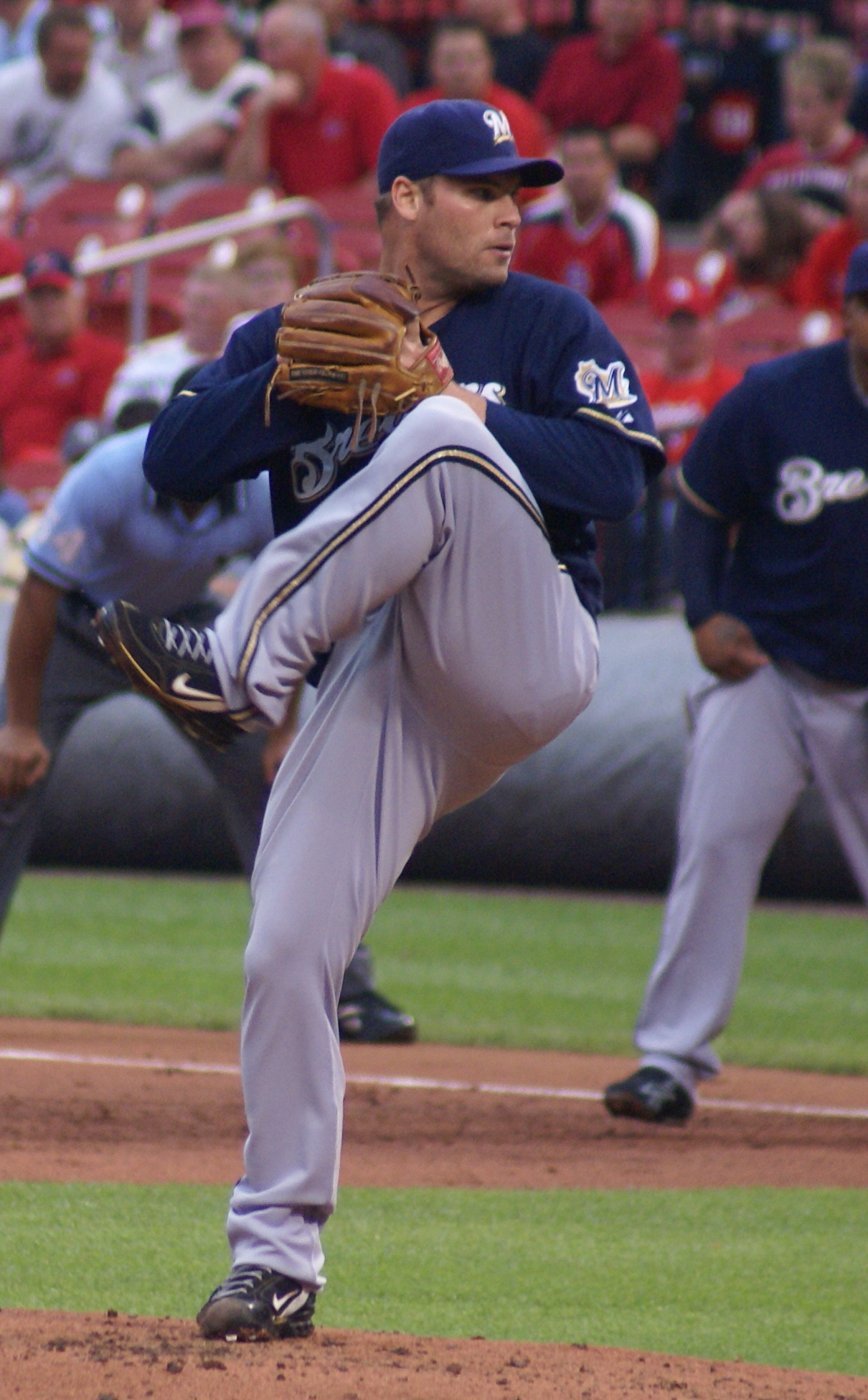 Ben Sheets